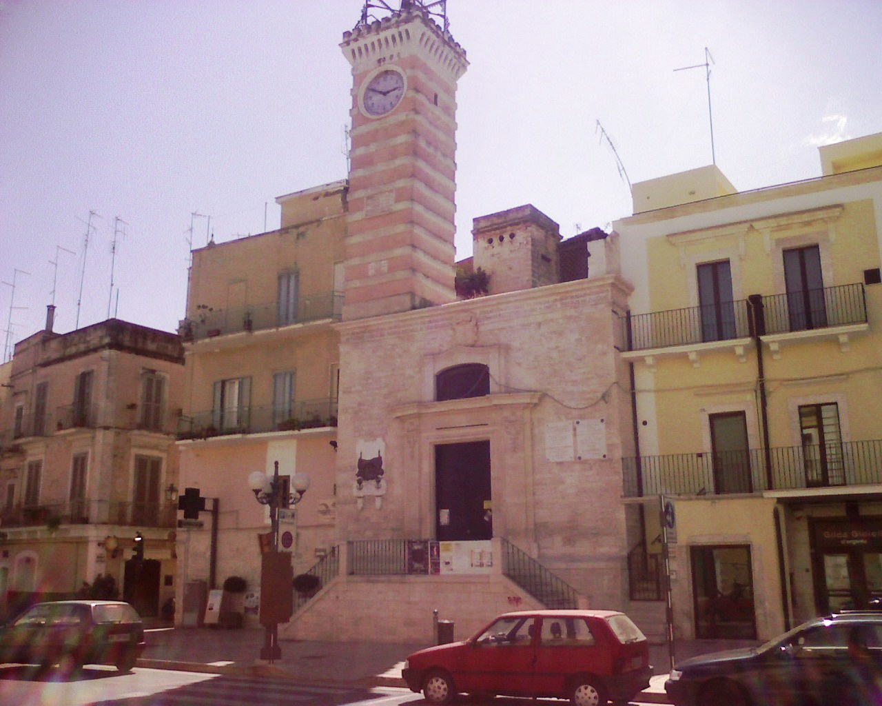 sede del sedile - Modugno (bari)-Italy